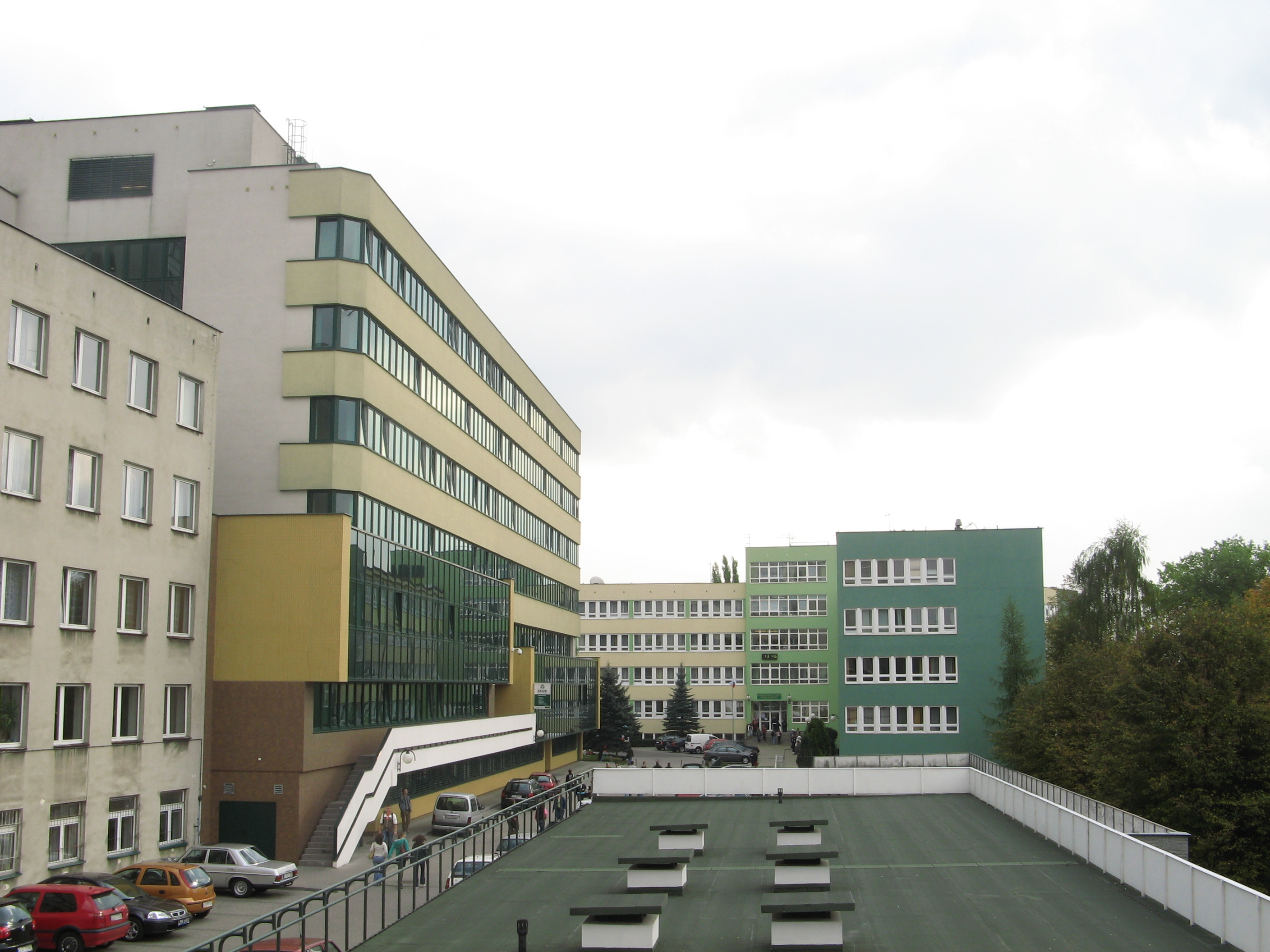 Miasteczko akademickie w Lublinie. Po lewej nowy budynek Wydziału Humanistycznego Uniwersytetu Marii Curie-Skłodowskiej, dalej budynek Uniwersytetu Przyrodniczego.